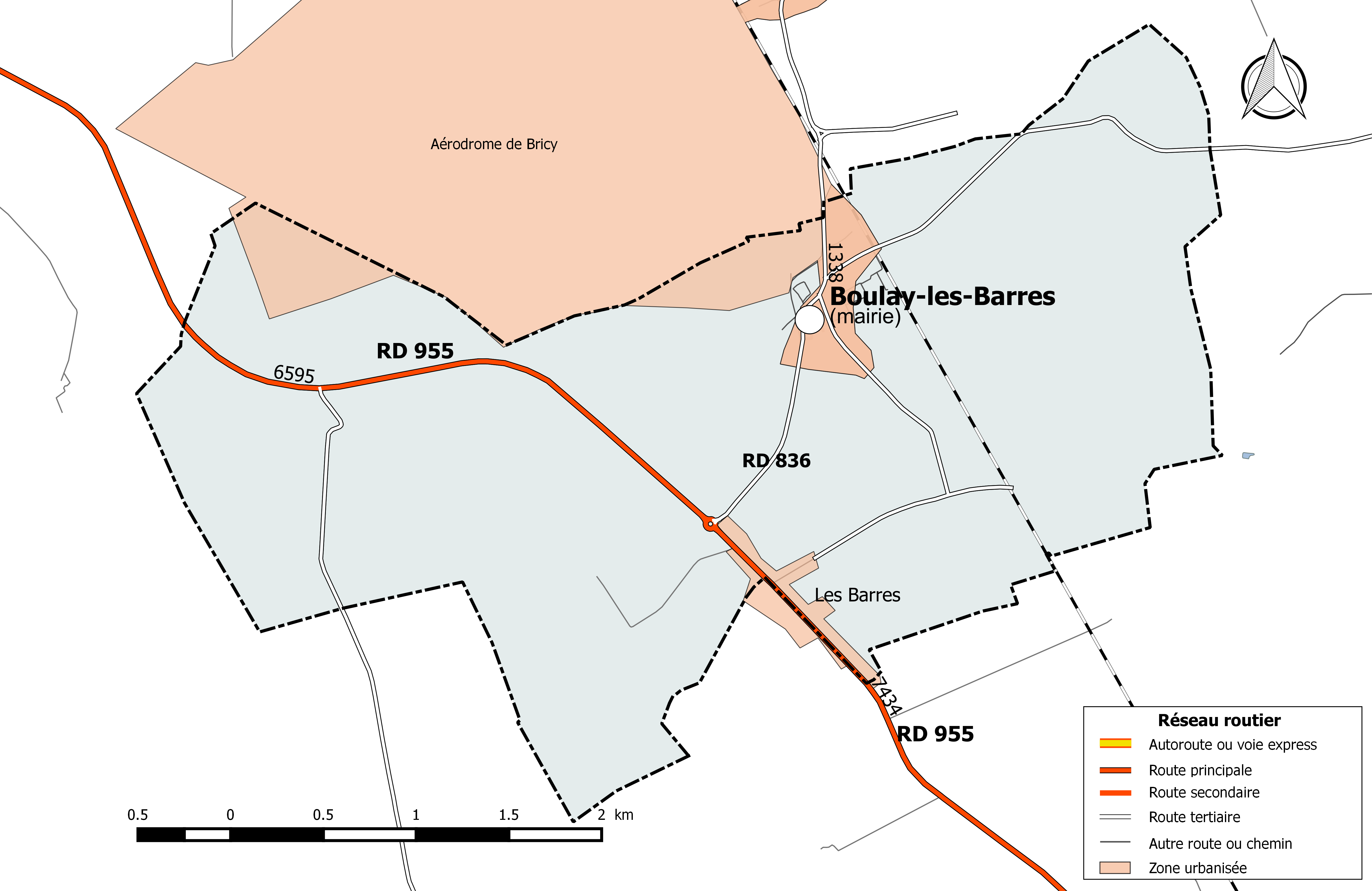 Carte du réseau routier de la commune de Boulay-les-Barres.